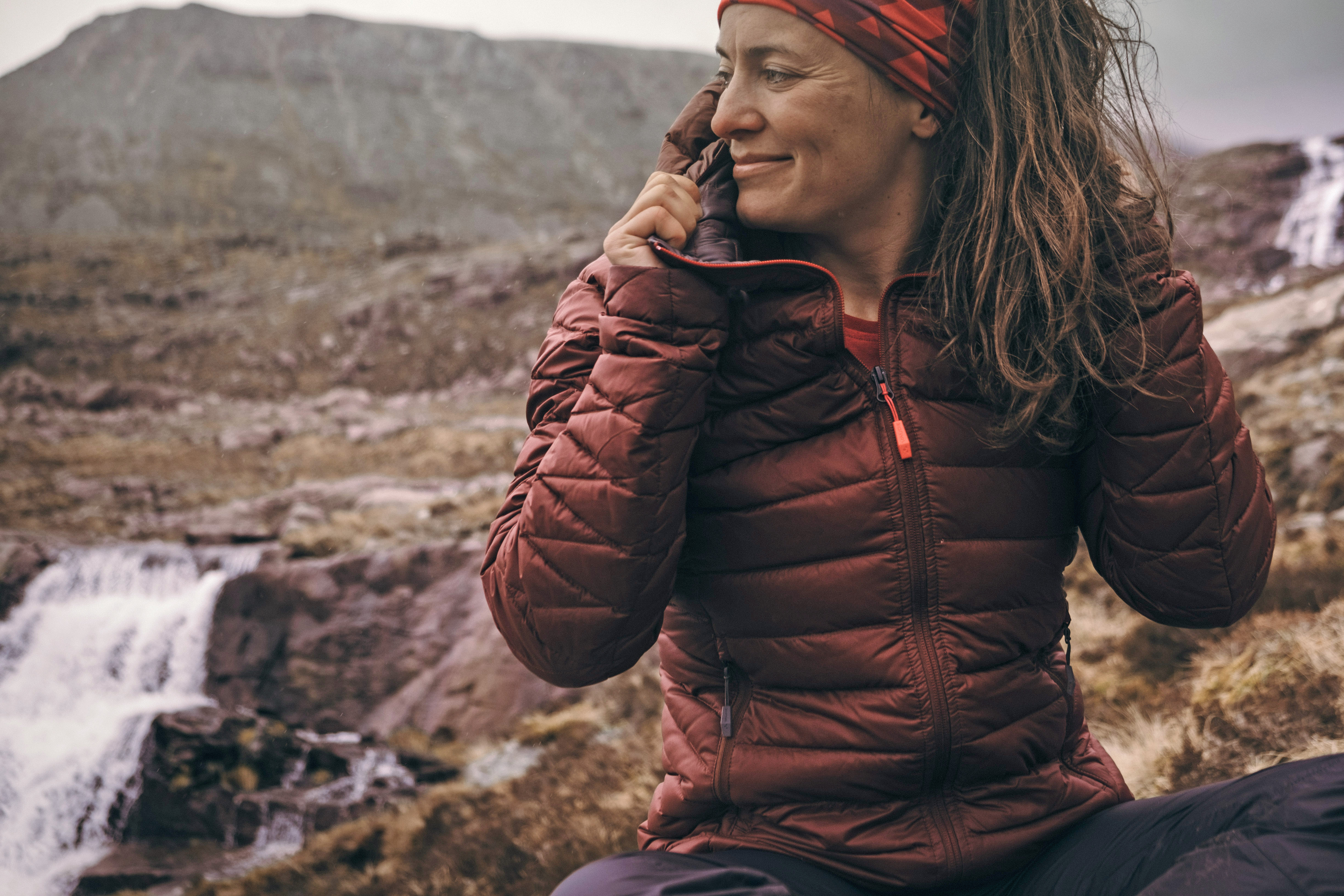 Ana Zirna